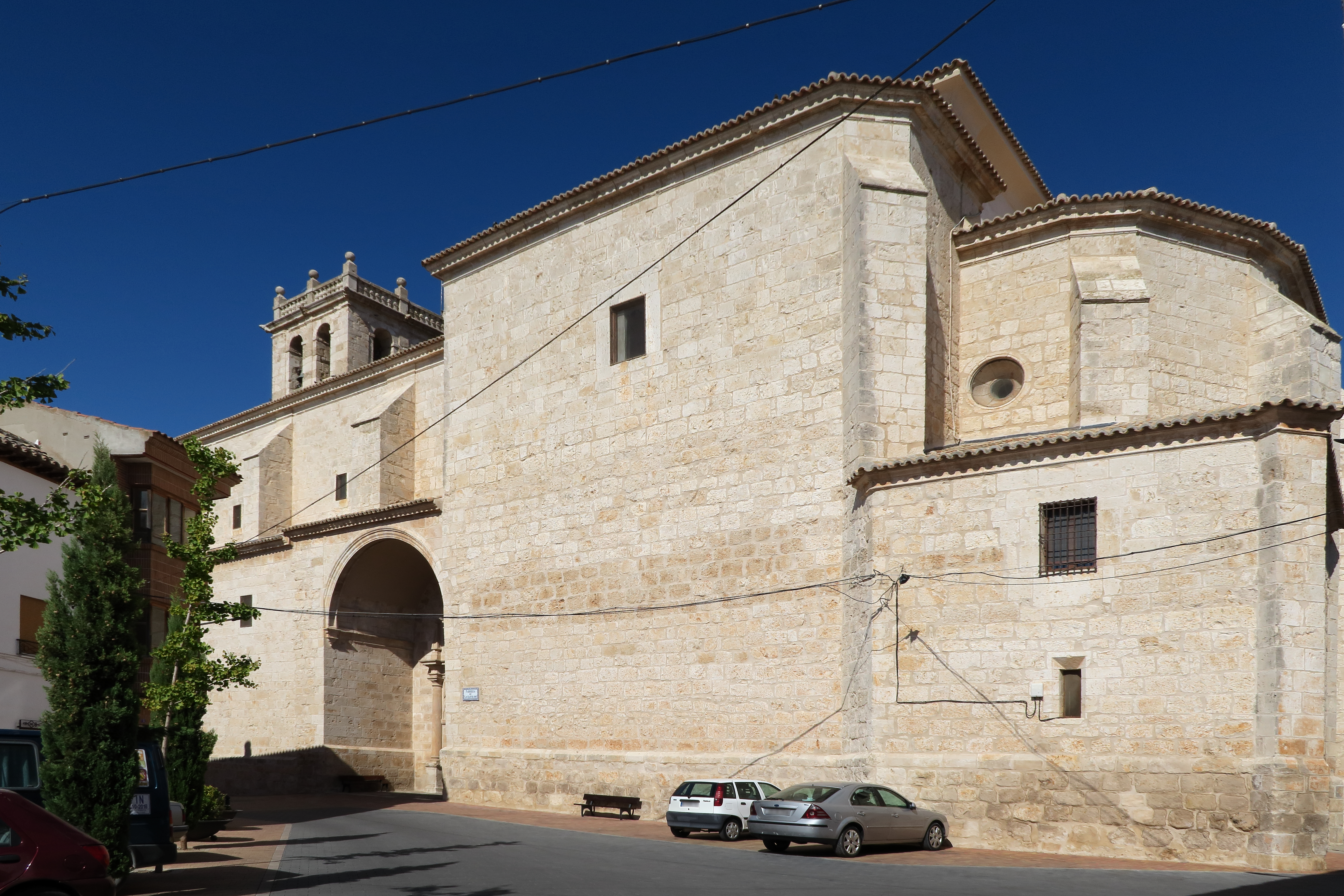 Iglesia de San Bartolomé, en Villarrubia de Santiago, fachada principal